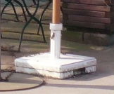 ehemalige Bedürfnisanstalt am Goldbekplatz, jetzt:Straßencafe; Architekt:Fritz Schumacher